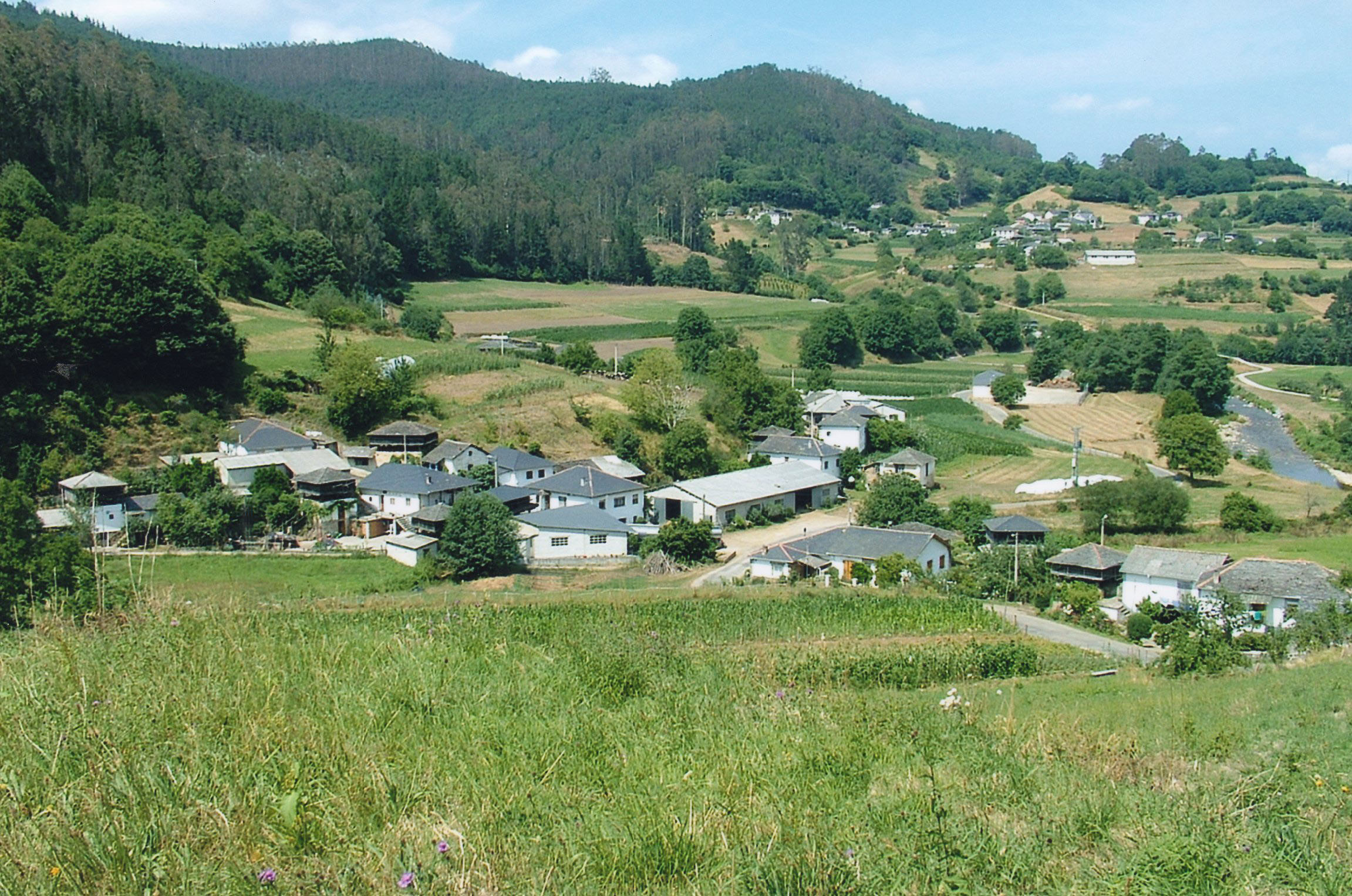 Panoramica del valle de Paredes: Agüera, Longrey y el suco